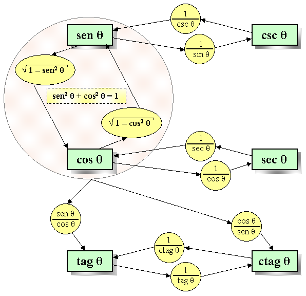 Identidades trigonométricas fundamentales. Las principales funciones trigonométricas y las relaciones entre ellas.